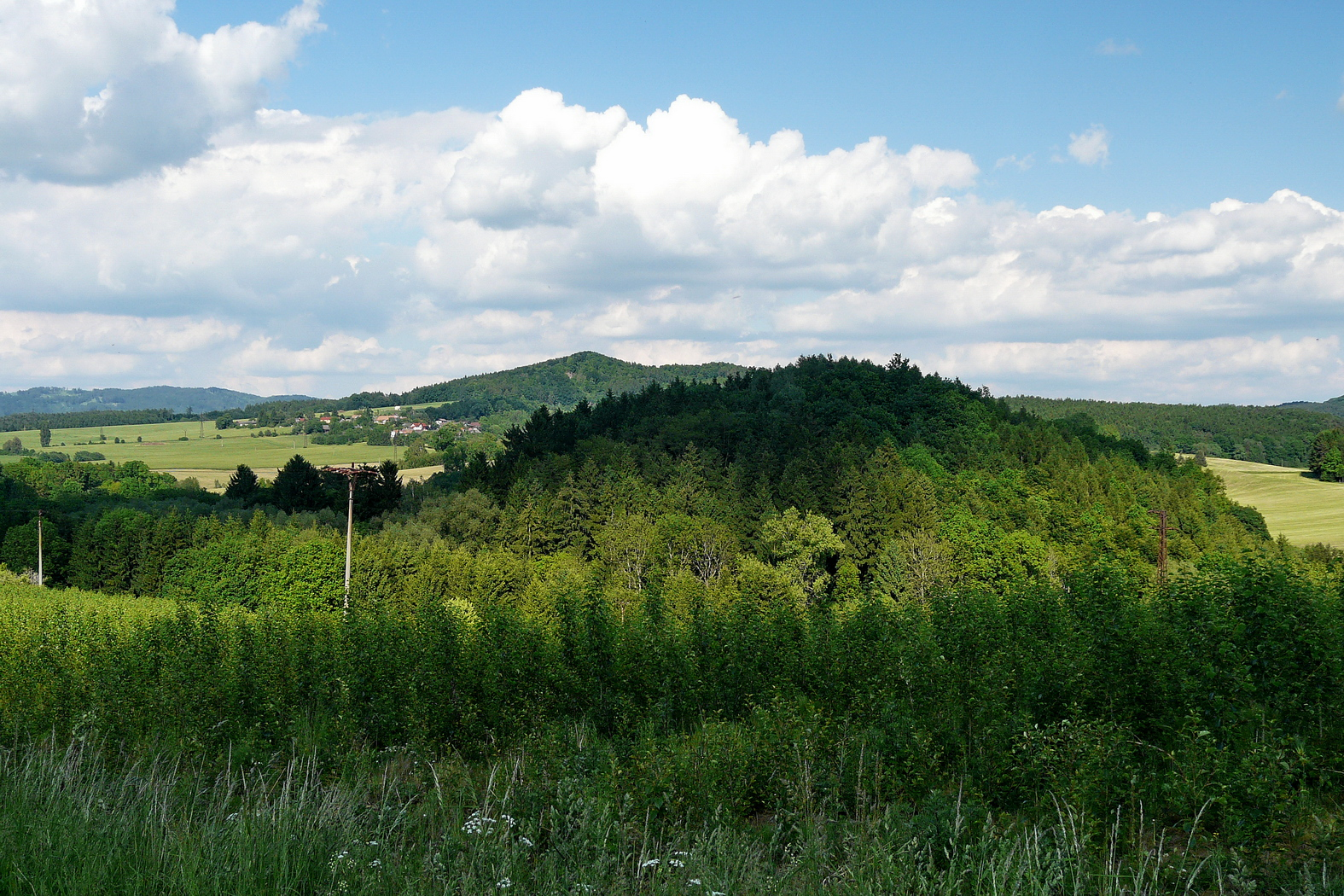 Vrch Hrádek, za ním Střelečská hůra